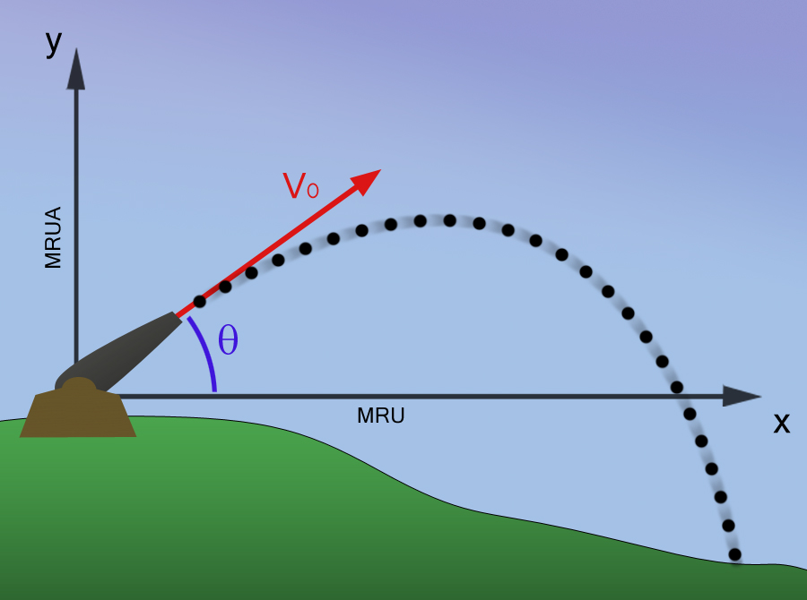 Schéma pour l'explication de la balistique